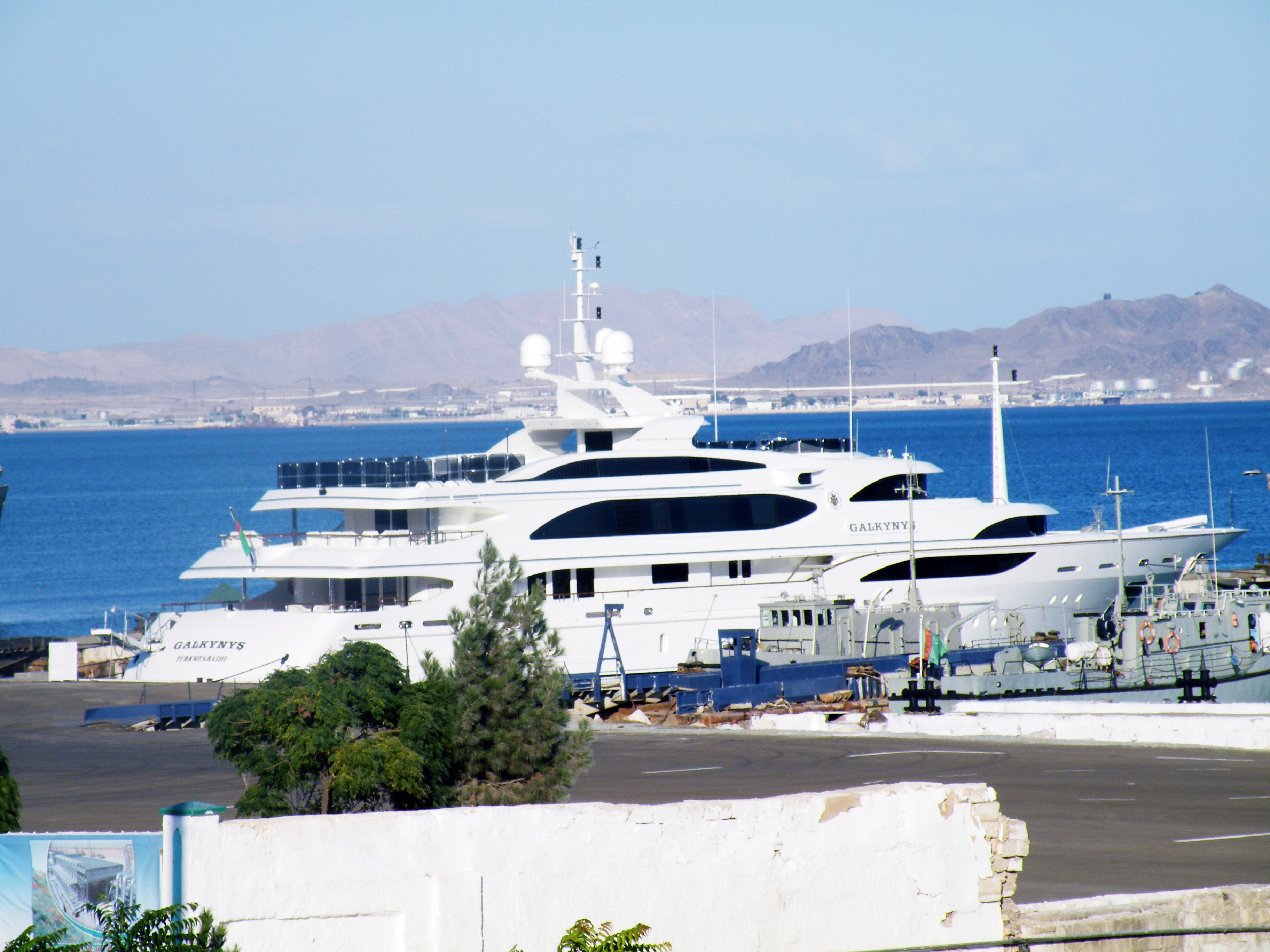 Яхта Галкыныш, в порту Туркменбаши